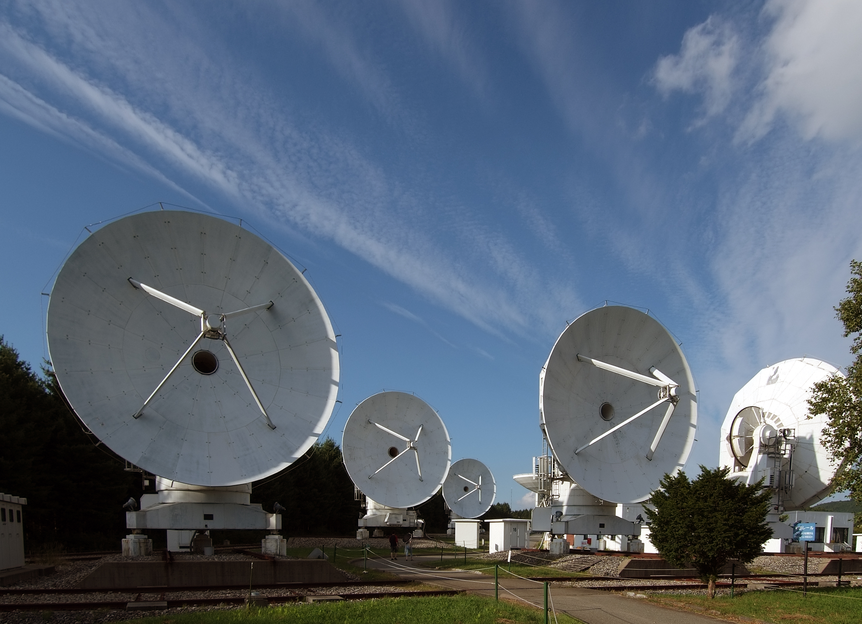 Nobeyama radio observatory, at Minamimaki Nagano Japan.